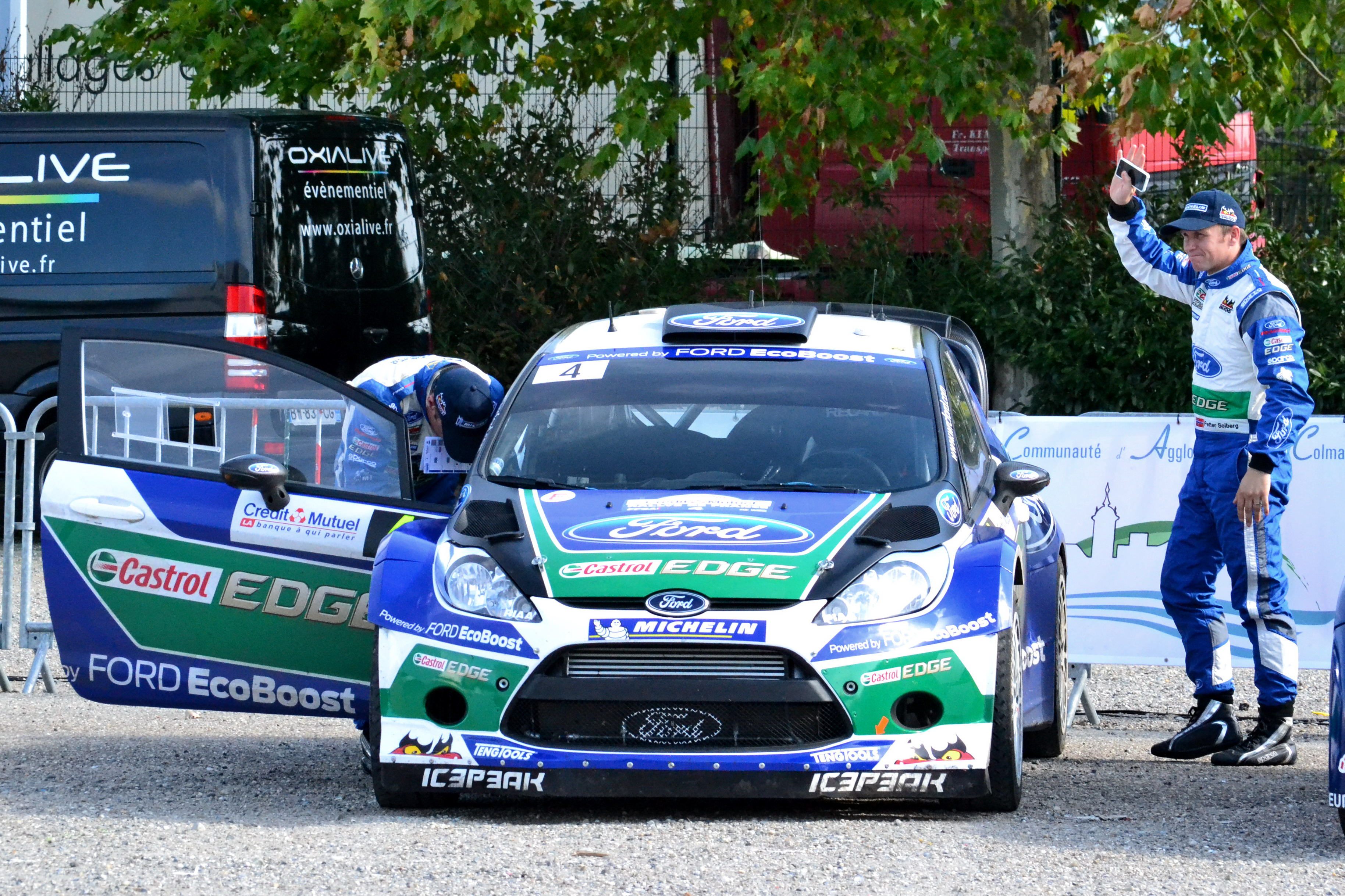 Petter Solberg au parc d'assistance de Colmar durant le Rallye de France-Alsace 2012.